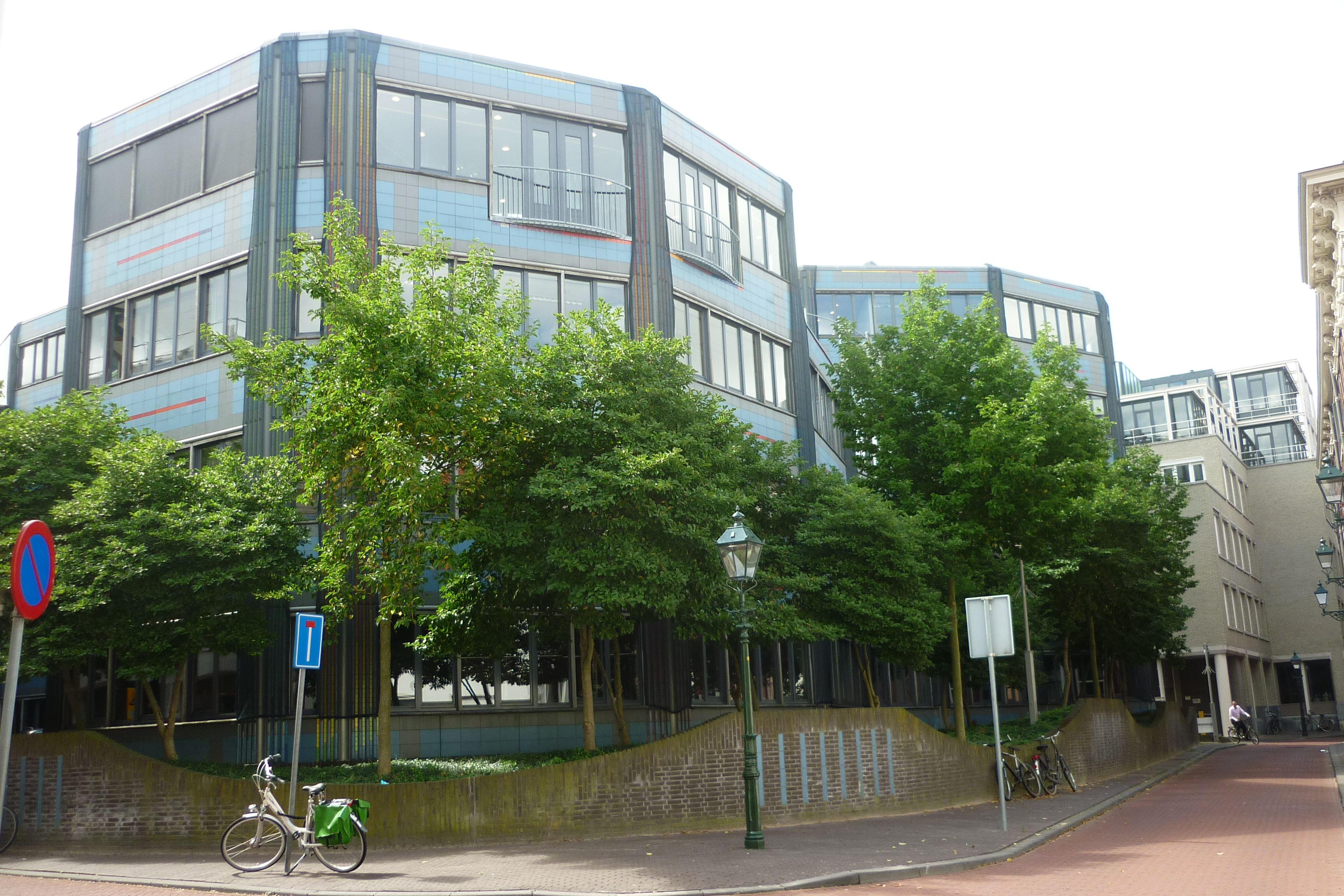 Kazernestraat, achterkant van de Algemene Rekenkamer